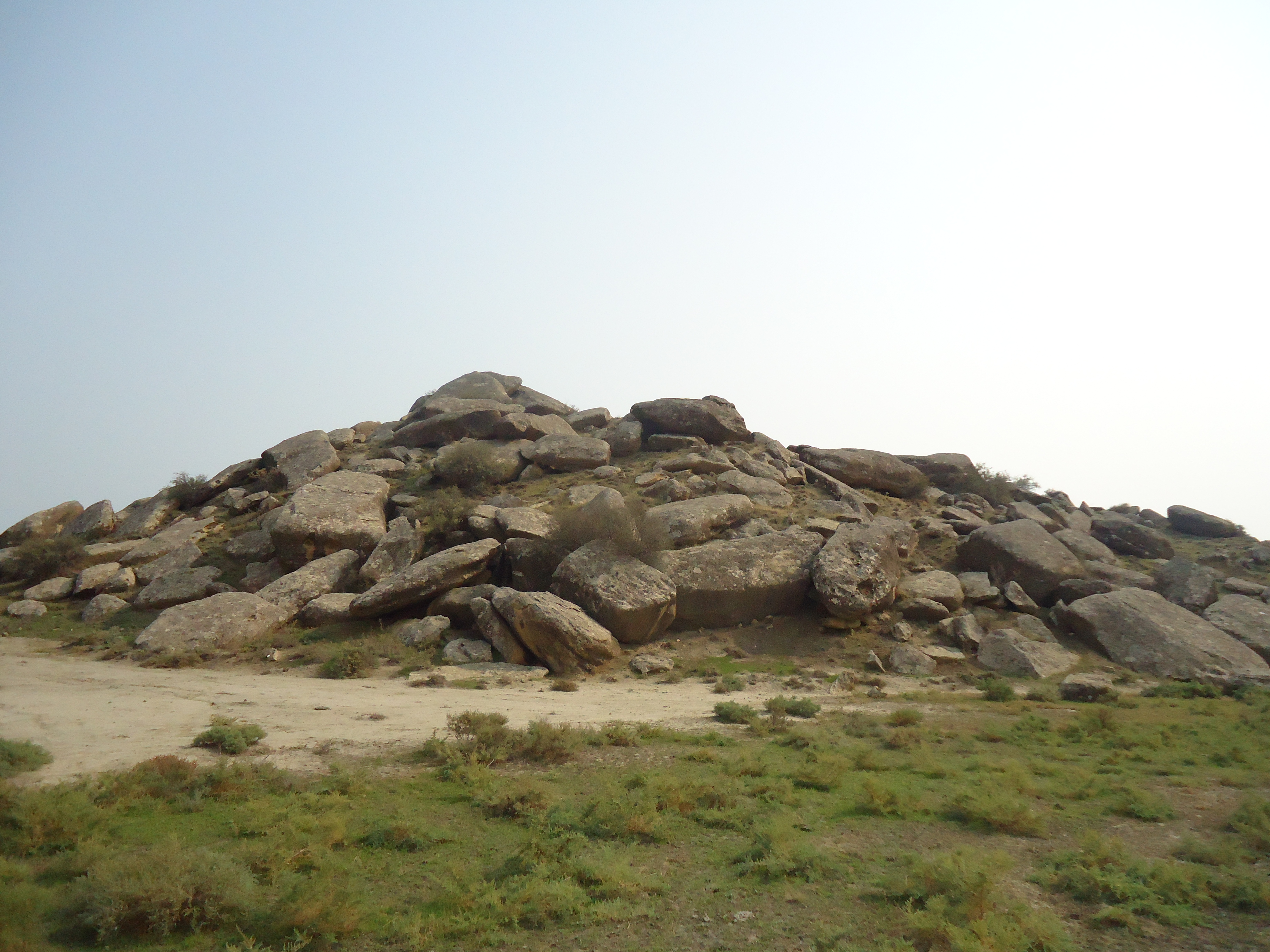 1966-cı il sentyabr ayının 9-da Qobustanda qədim qayaüstü təsvirlər saxlanmış və qədim arxeoloji abidələr, düşərgələr qeydə alınmış Cingirdağ dağı və Yazılıtəpə ərazisi Böyükdaş, Kiçikdaş dağları ilə birlikdə Respublika Nazirlər sovetinin 509 №-li qərarı ilə Dövlət tarixi-bədii qoruğu elan edilib.